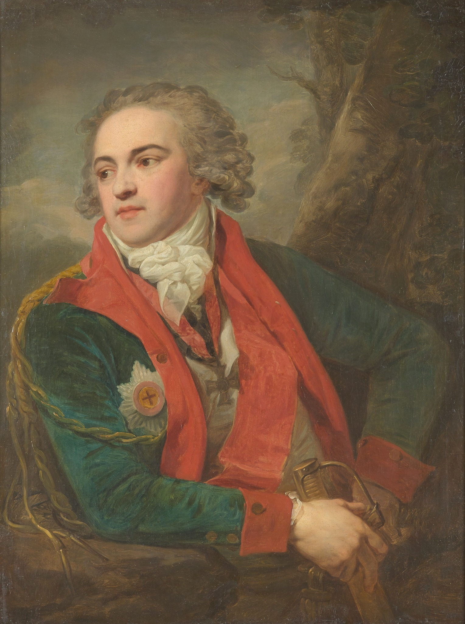 Stepan Stepanovich Apraksinlabel QS:Lru,"Апраксин, Степан Степанович" label QS:Len,"Stepan Stepanovich Apraksin"